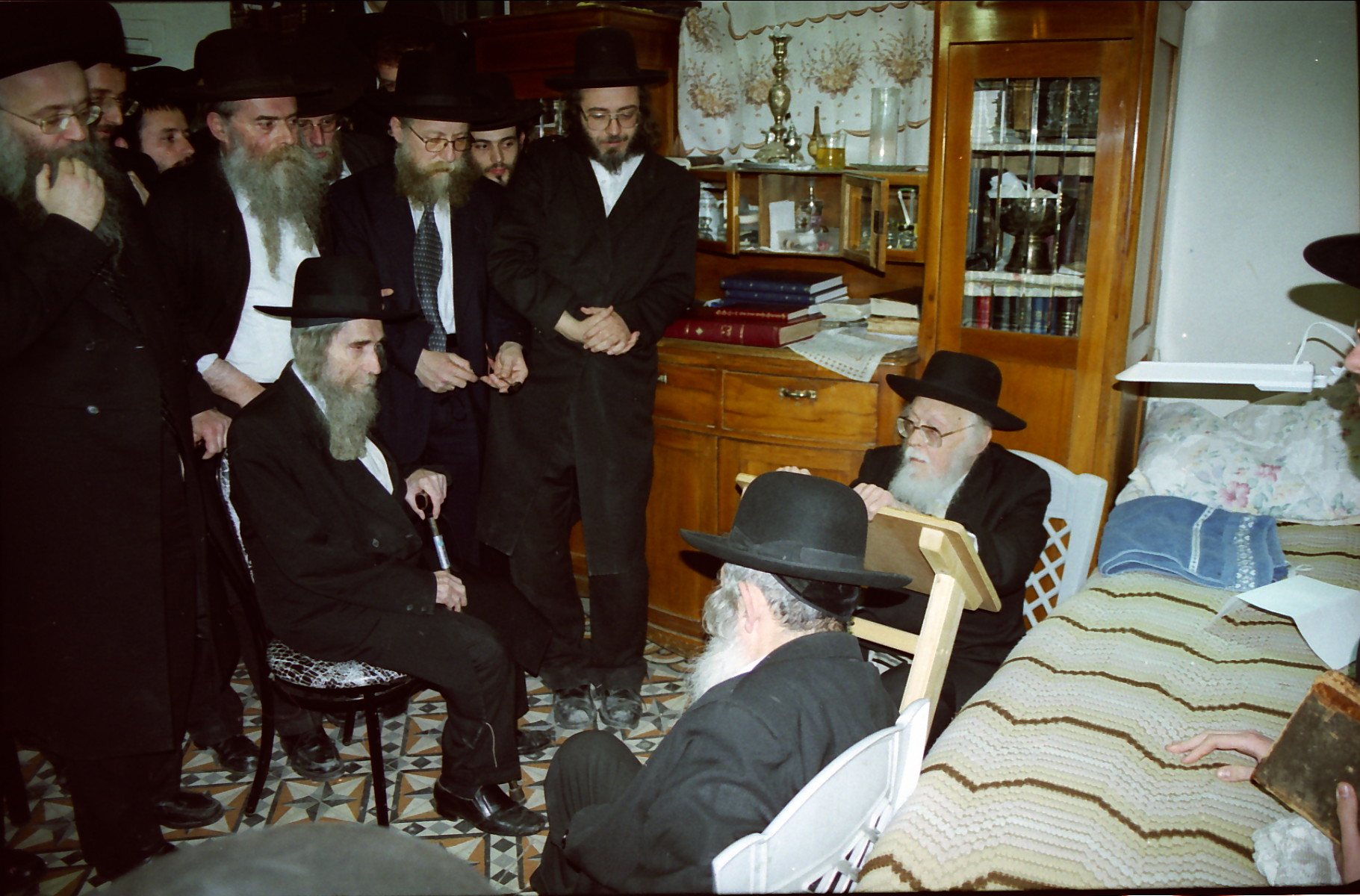 הרב אלישיב ישב שבעה על פטירת בתו